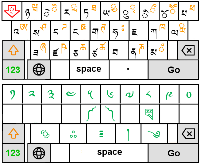 iOSのチベット語キーボード。